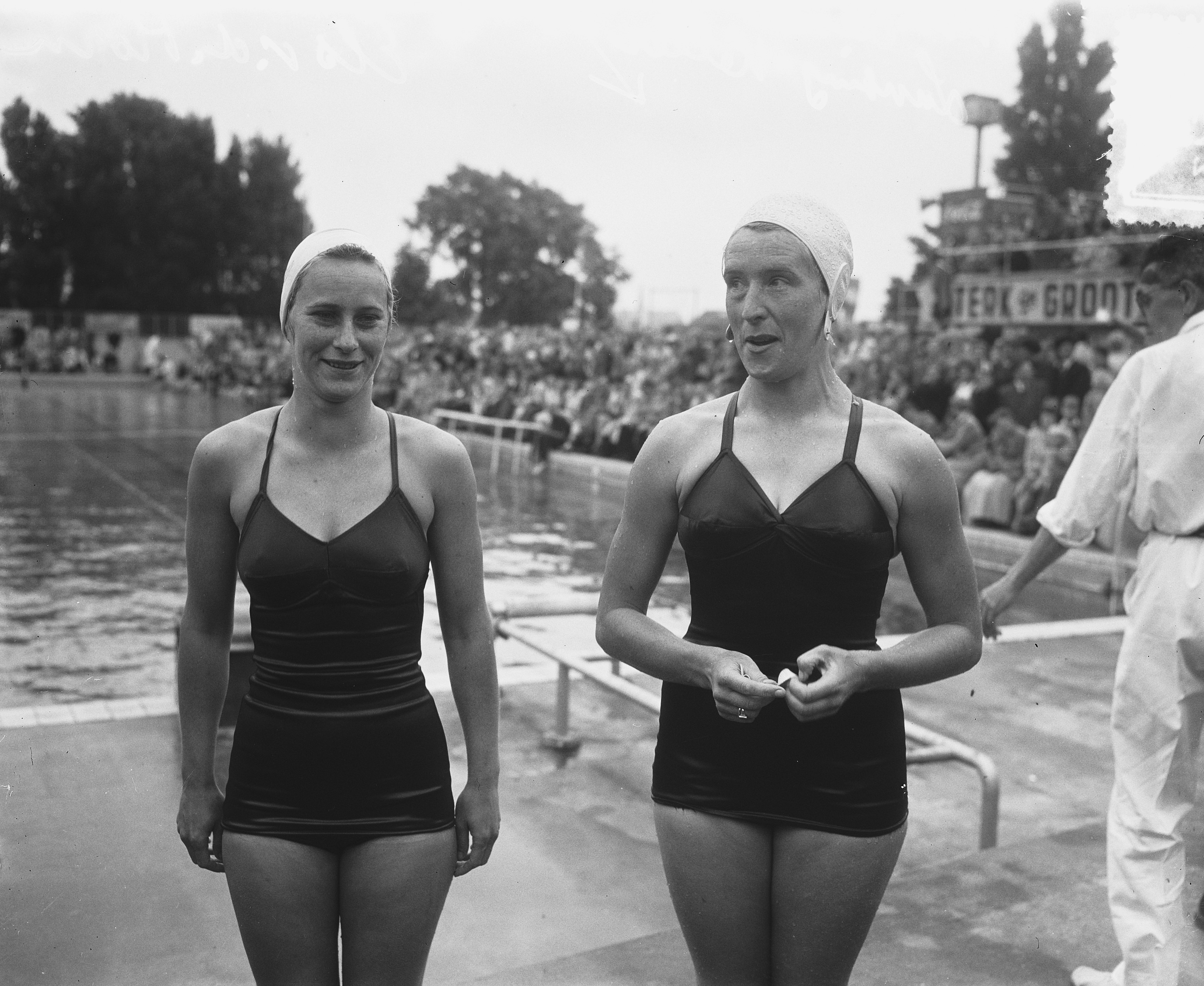 Leny Lanting-Keller en Els van de Horn (links)